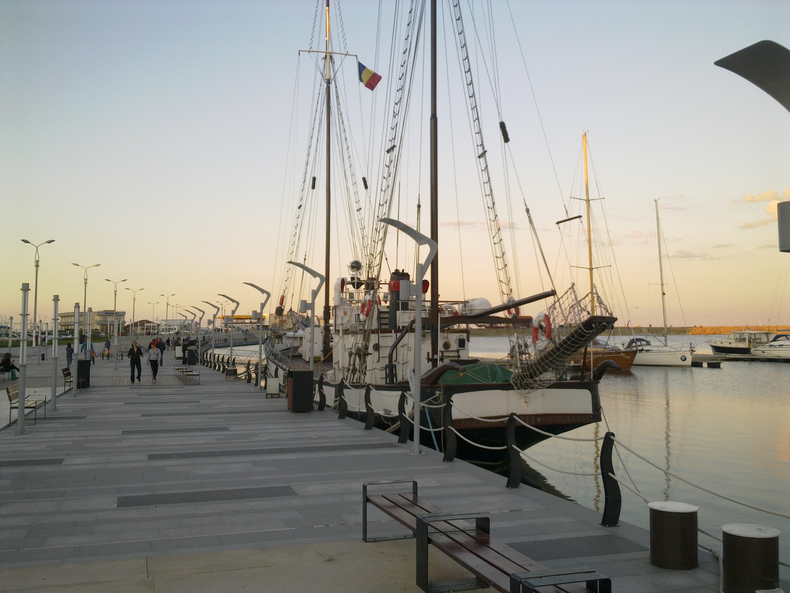 Portul Turistic Mangalia - Marea Neagra/Romania